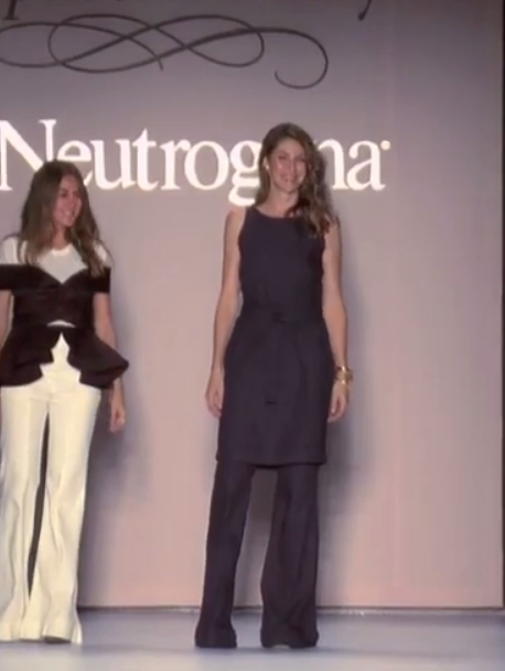 Adriana Arboleda y Johanna Ortiz en el desfile de Pink Filosofy en el Cali ExpoShow 2016